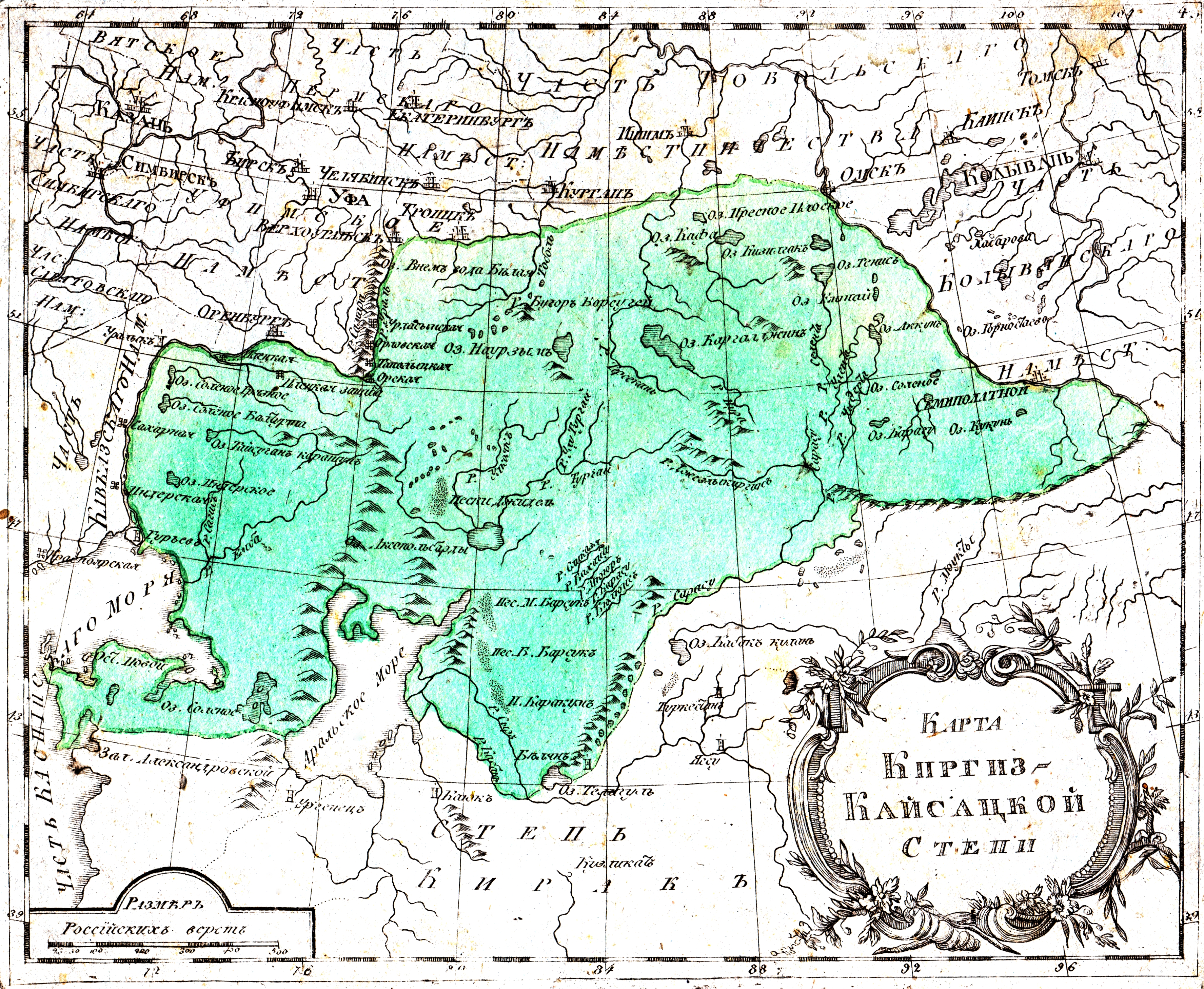 Карта Киргиз-Кайсацкой степи, Атлас Российской империи, 1793 год